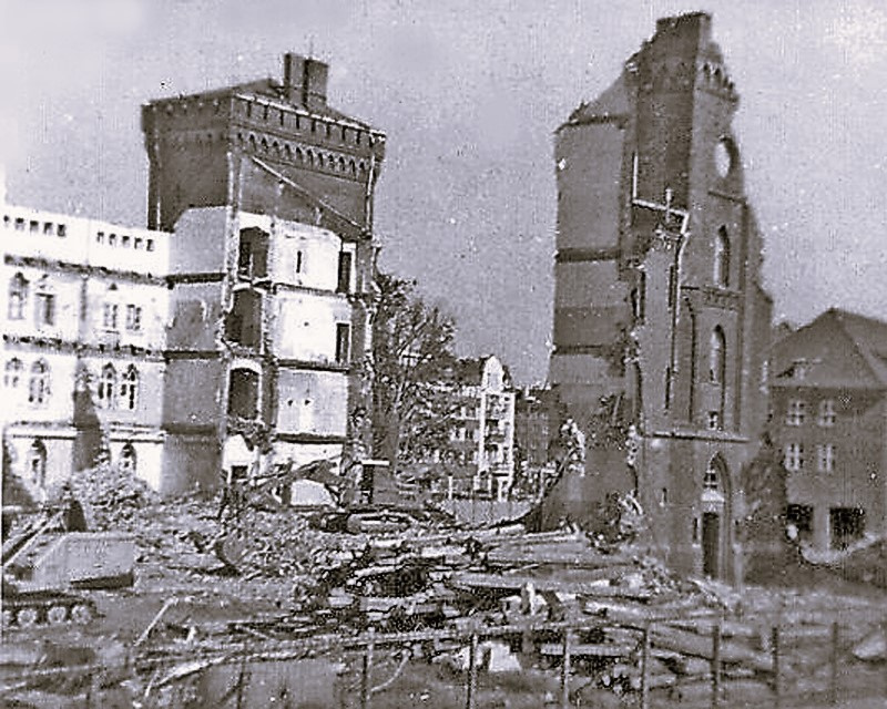 Abbruch der Kaserne in der Fackenburger Allee, 1976